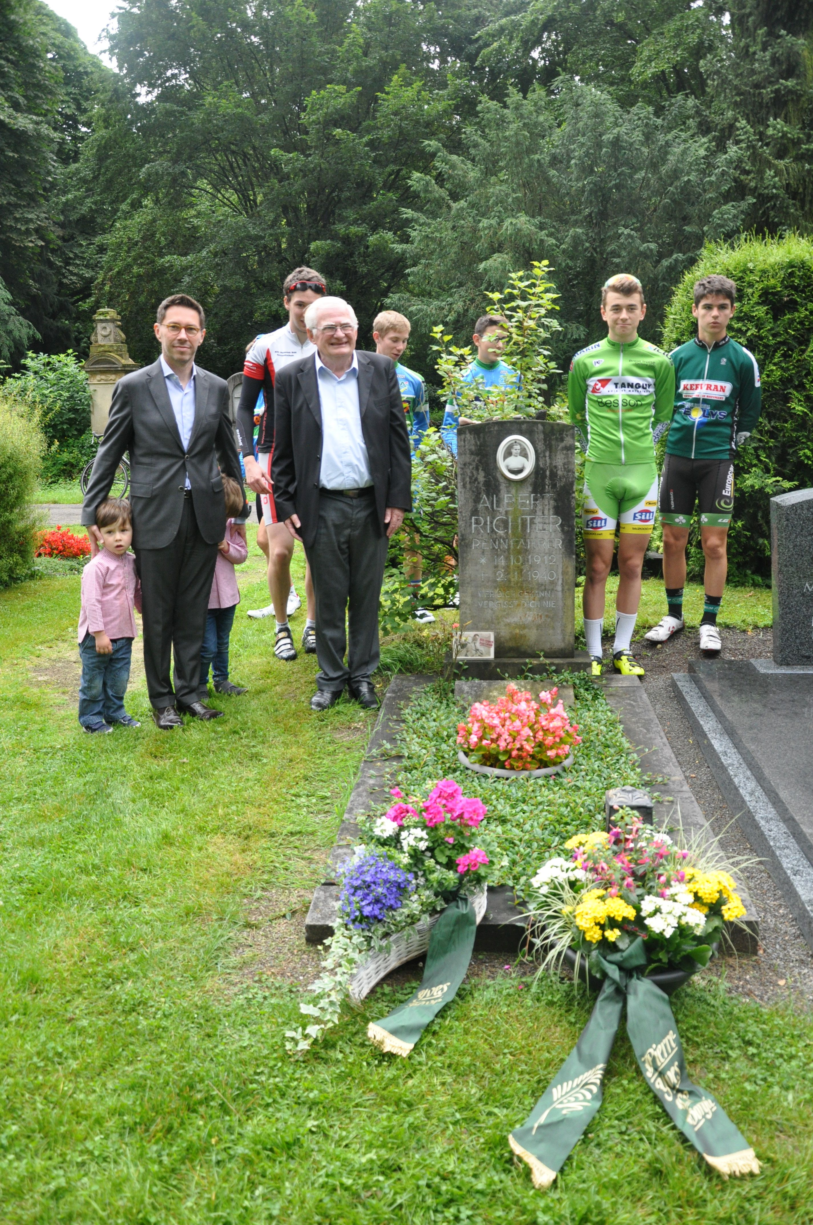 Der französische Abgeordnete Pierre-Yves Le Borgn’ (l.), mit Yves Favé, Sohn des Radrennfahrers Fañch Favé, am Grab des Kölner Radsportlers Albert Richter auf dem Ehrenfelder Friedhof. Dabei eine Delegation von französischen Nachwuchs-Rennfahrern